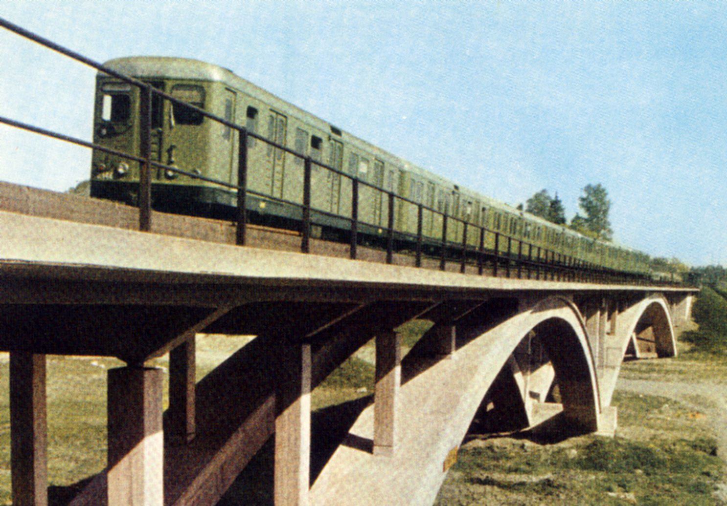 Stockholms tunnelbana på Råckstaviadukten